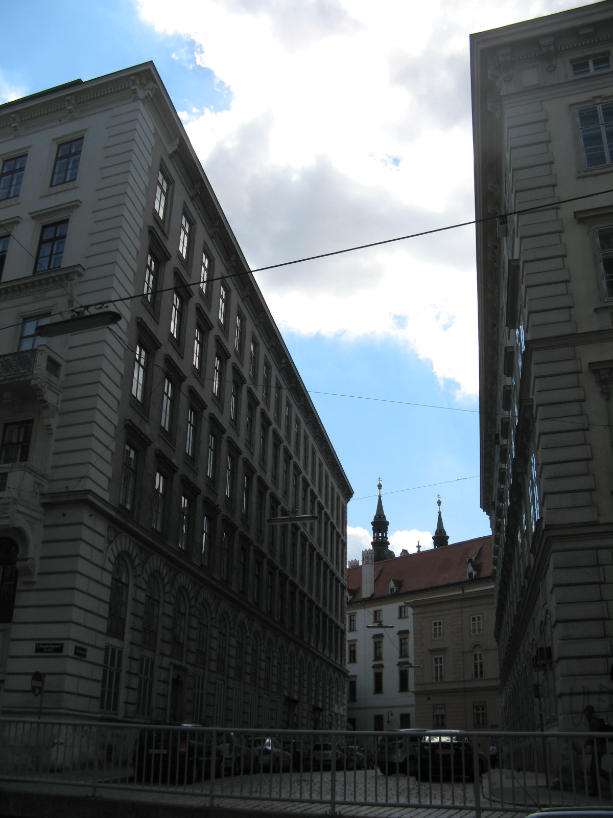 Barbaragasse von Dominikanerbastei gegen Westen